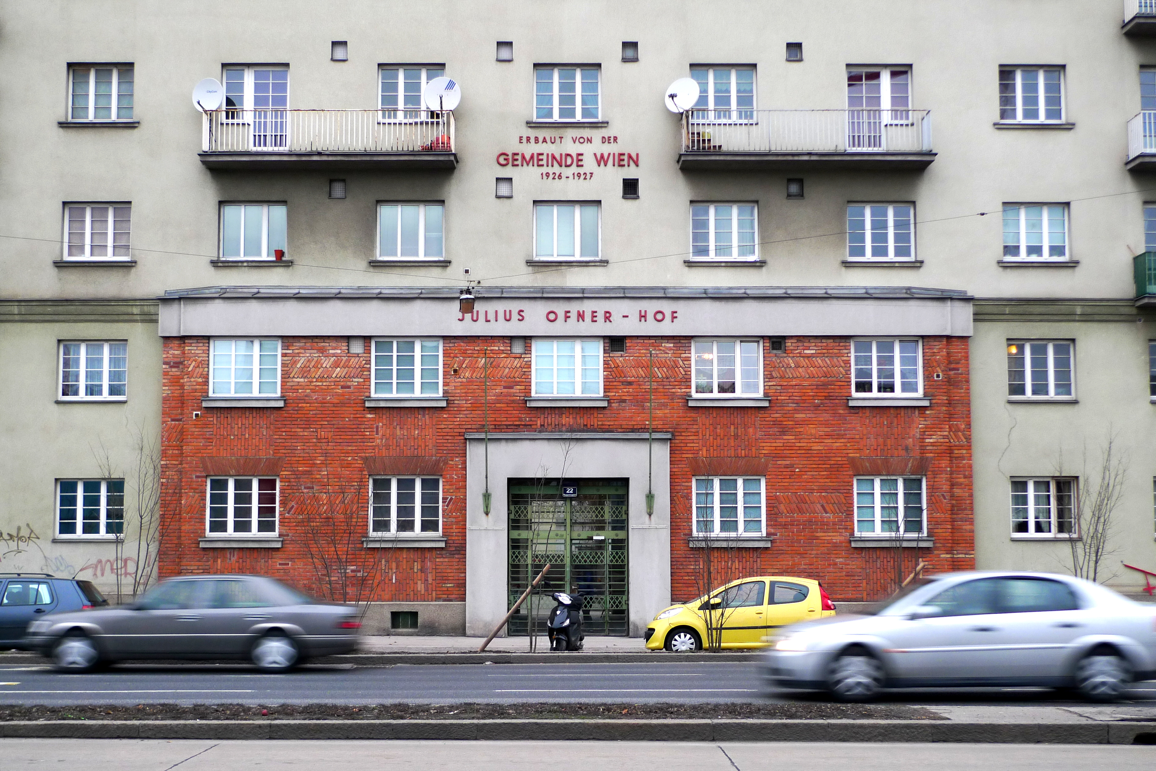 Kommunaler Wohnbau, Julius-Ofner-Hof